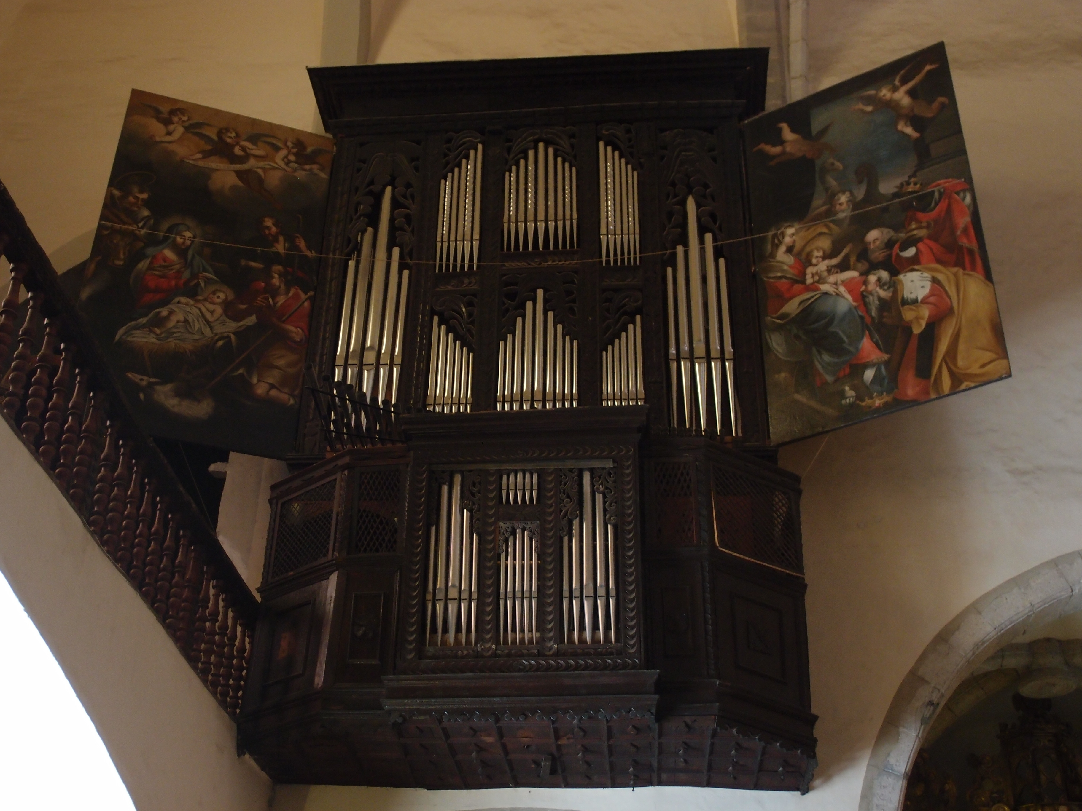 Kirche Santa Maria in Cadaqués (Orgel) Datum: 18.09.2013 Urheber: M. Pfeiffer alias Benutzer:Gordito1869 Quelle: privates Fotoarchiv des Urhebers